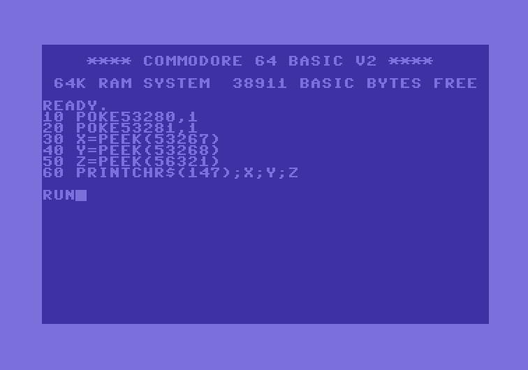 Idealisierte Farben